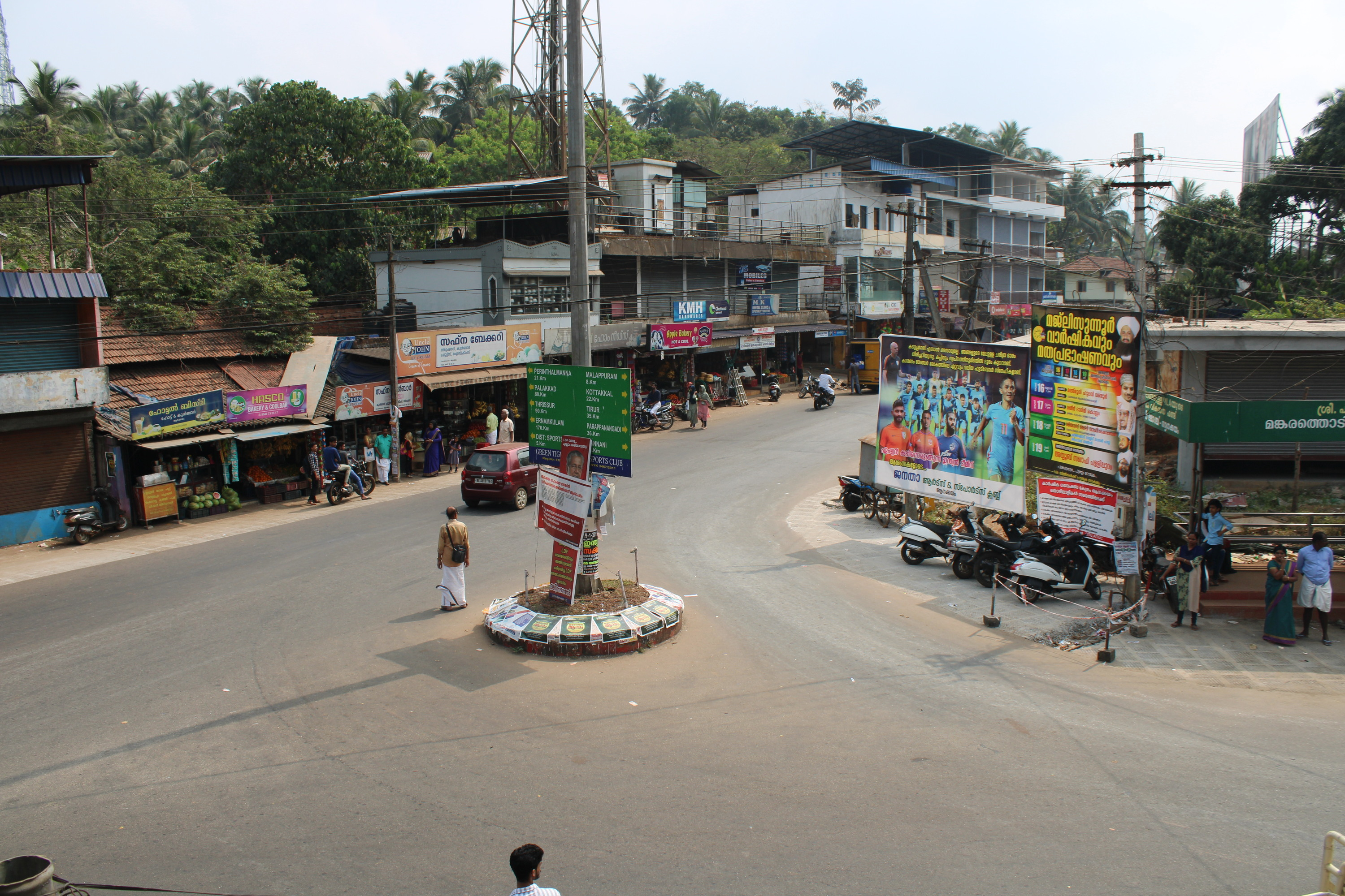 ആനക്കയം ജംങ്ഷന്‍